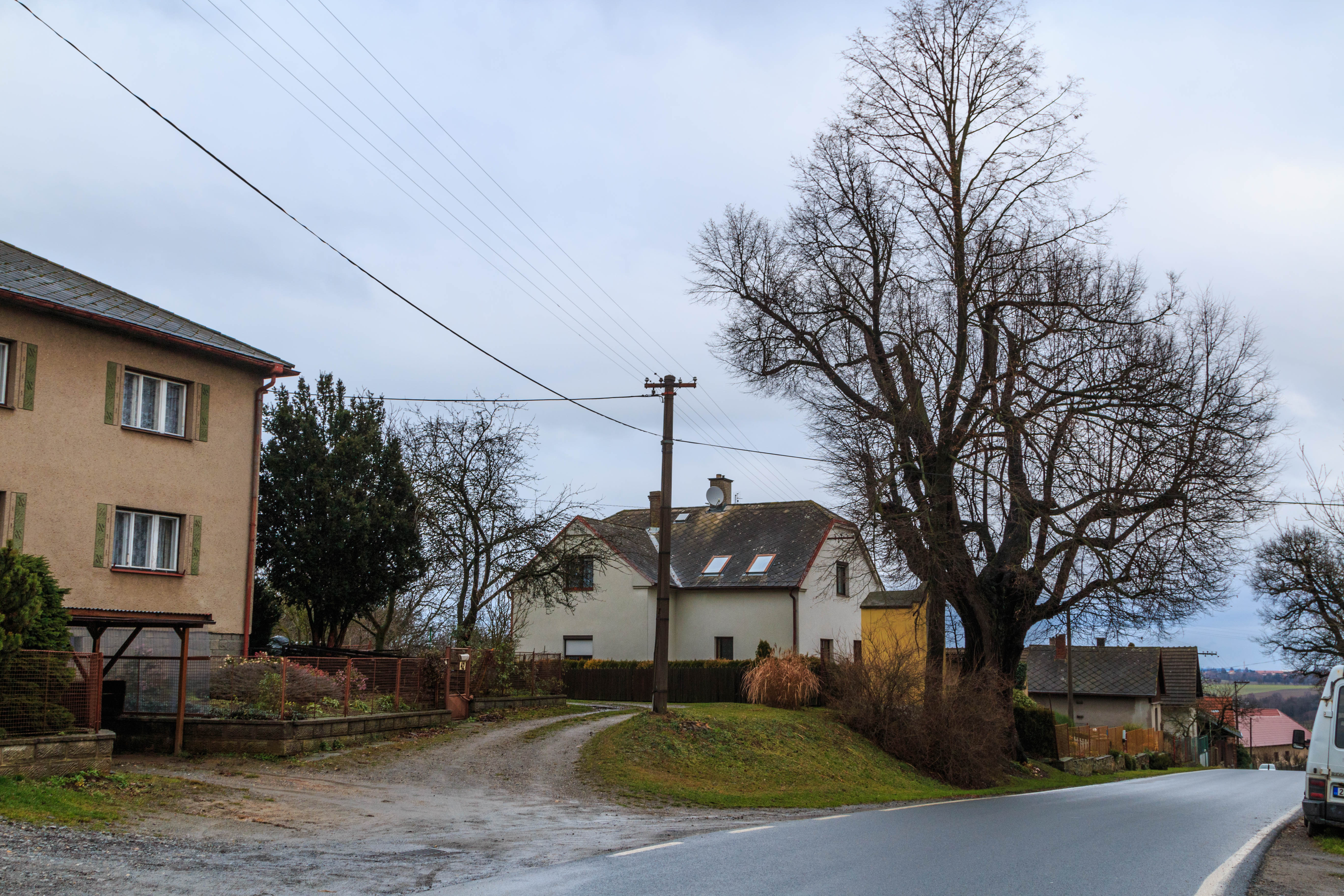 Bačkov čp. 17